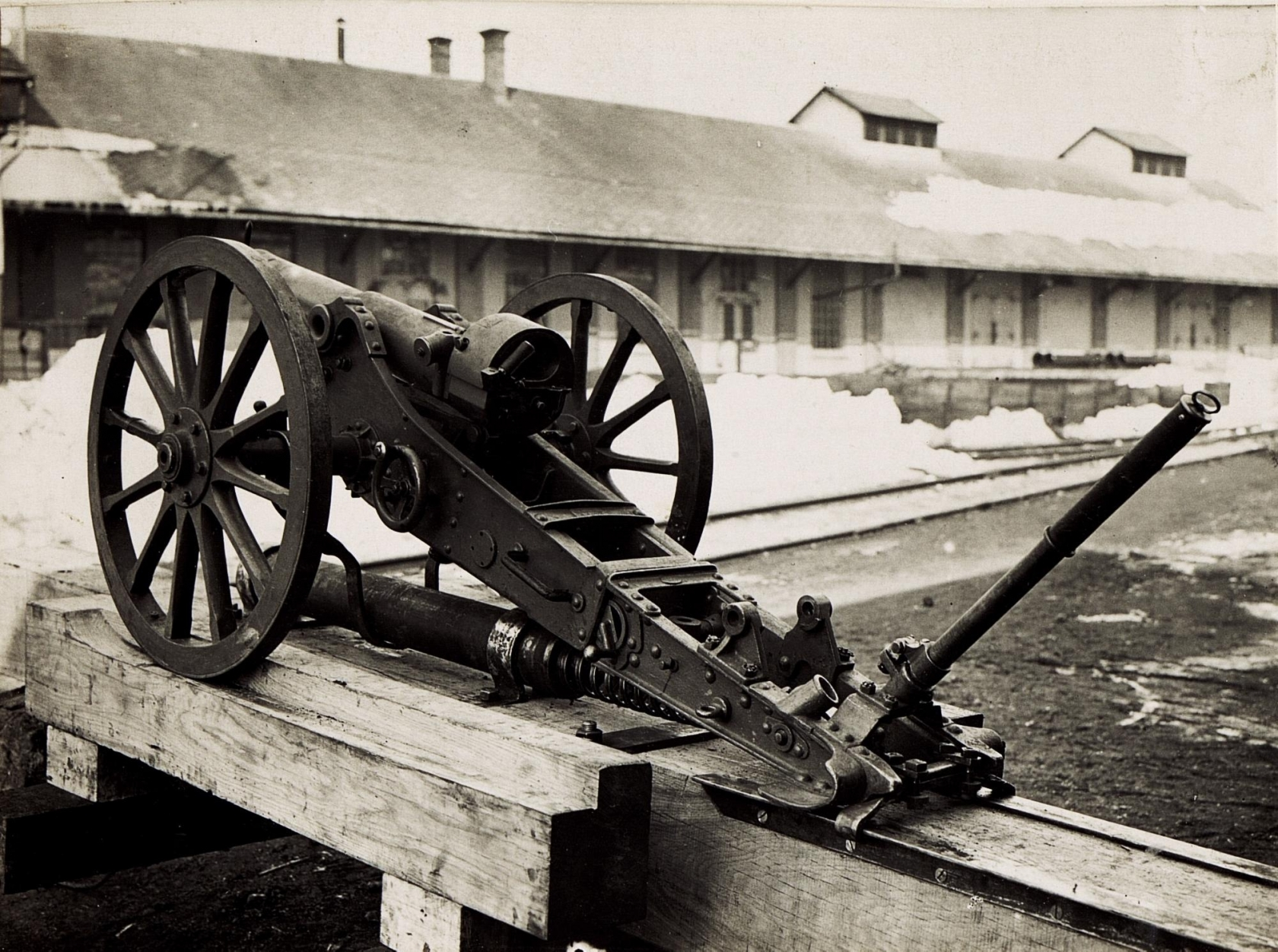 7cm M.99 Gebirgkanone mit Verschluss Kavernen-Rahmen.